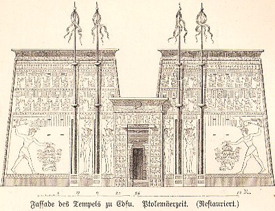 Description: temple of Edfu (Egypt) *Source: from the German 1891 encyclopedia Joseph Kürschner (editor): “Pierers Konversationslexikon”. Pierers Konversationslexikon. Siebente Auflage. Mit Universal-Sprachen-Lexikon nach Prof. Joseph Kürschners System. Union. (published by) Deutsche Verlagsgesellschaft in Stuttgart, 1891. herausgegeben von (edited by) Joseph Kürschner *Wikified and scanned by --Immanuel Giel 12:02, 20 May 2005 (UTC)